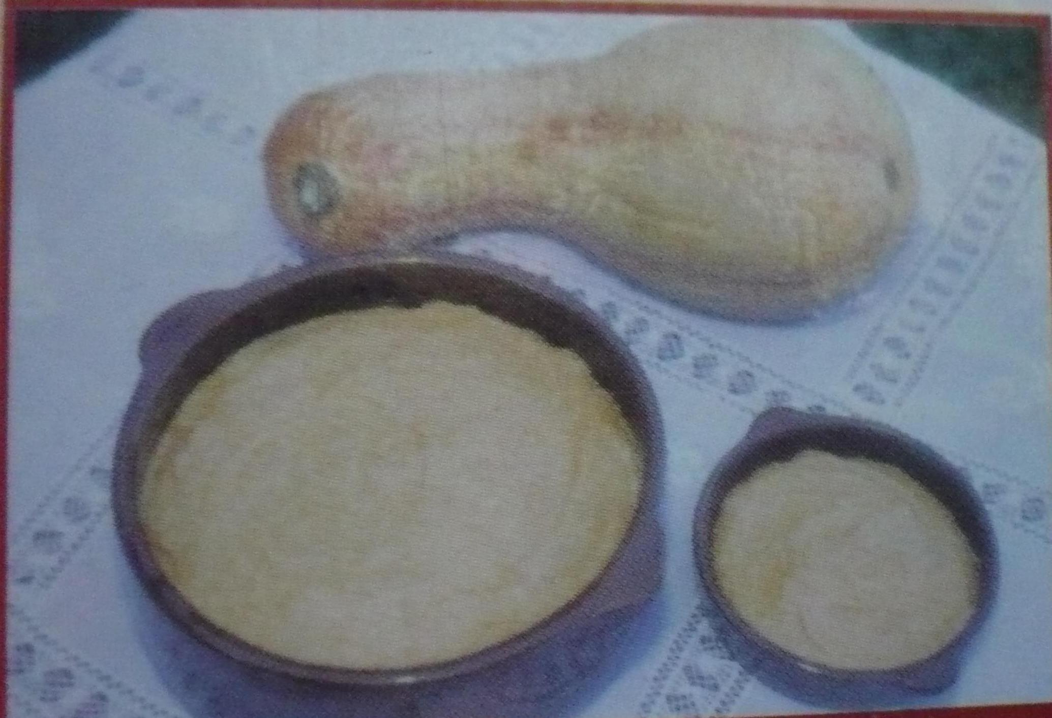 Kivevé